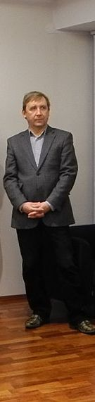 "Mandariinide" tegija Elmo Nüganen välisministeeriumi kultuuripreemia kätteandmisel